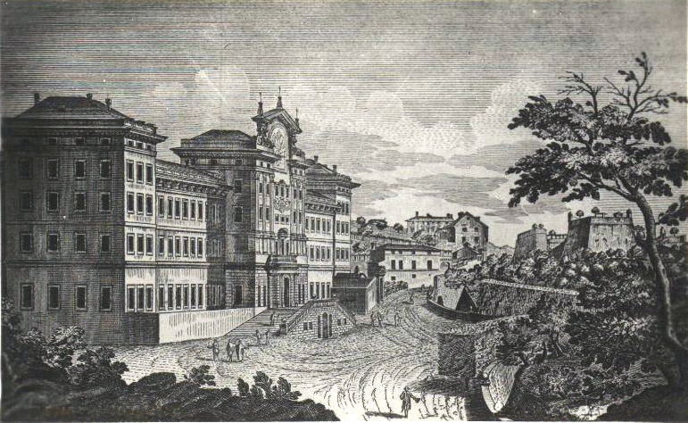 Albergo dei poveri di Genova, 16,5 x 26cm , incisione, Collezione Ernesto Grosso, Italia.